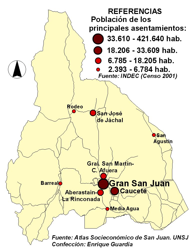 Mapa que representa la distribución de los principales asentamientos poblaciones, con su respectiva cantidad de habitantes, de la provincia de San Juan, ubicada en el centro oeste de Argentina.